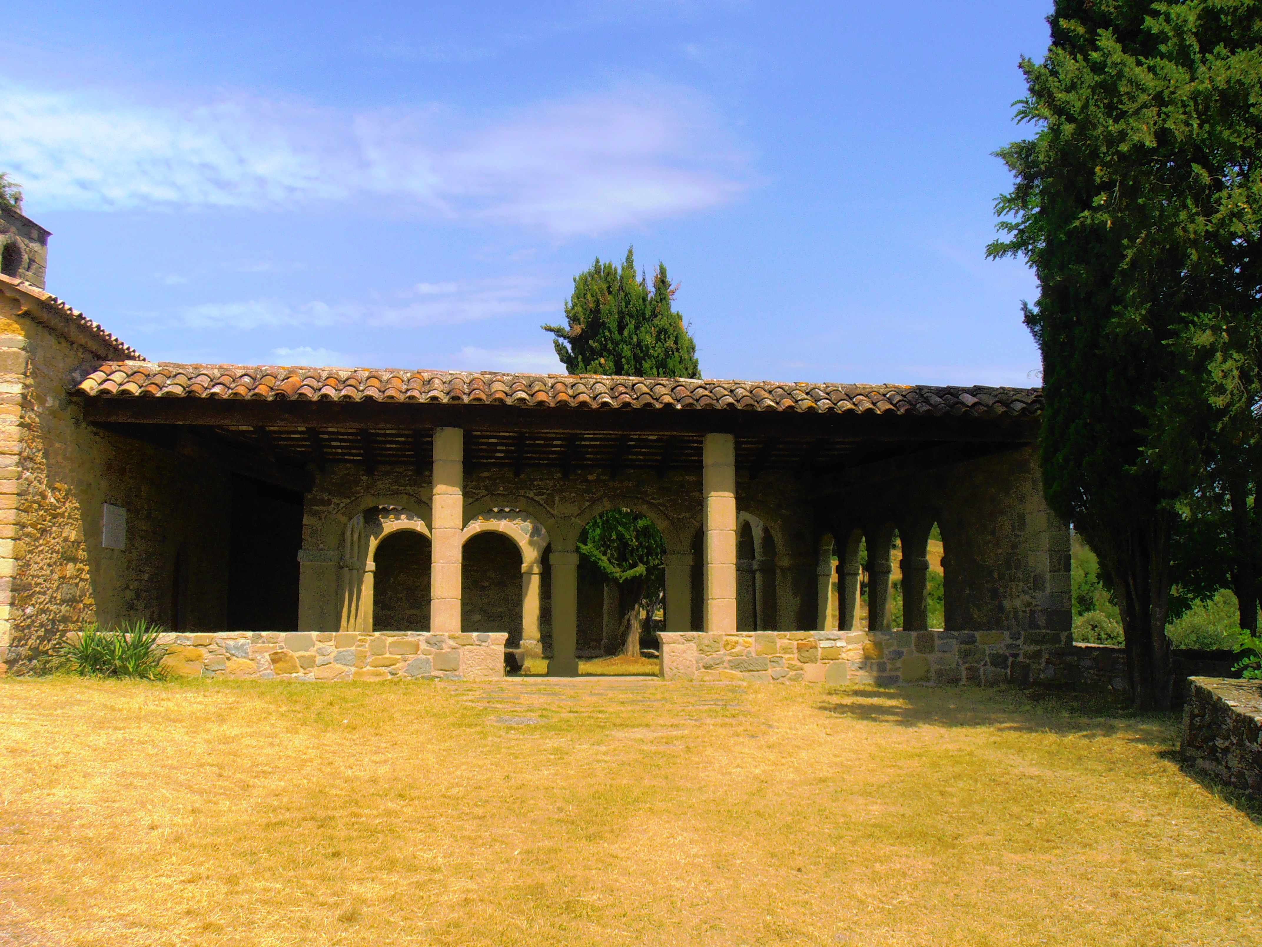 El Claustre vist frontalment